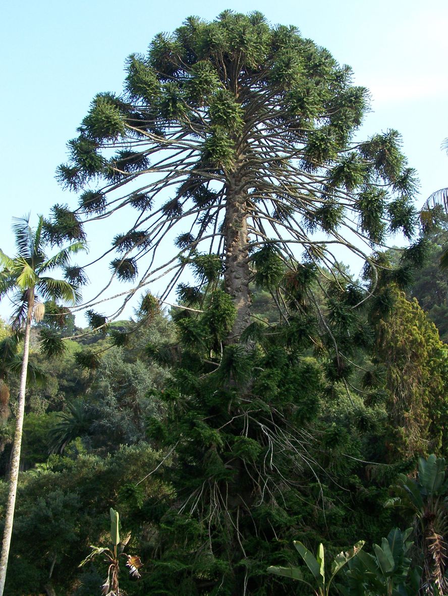 Palácio de Monserrate, vista para a Araucaria, a maior árvore do parque. Sintra, Portugal.